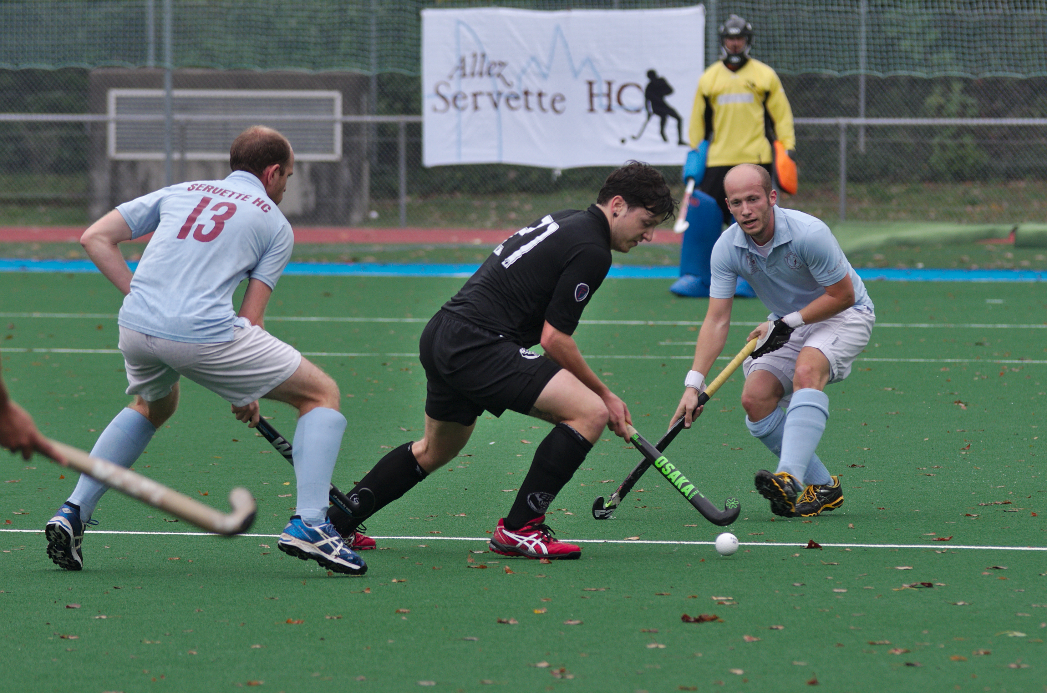 Hockey sur gazon - Servette HC vs Black Bloys HC - LNA hommes - 20141012 - Joueur du Black Boys HC aux prises avec deux joueurs du Servette HC